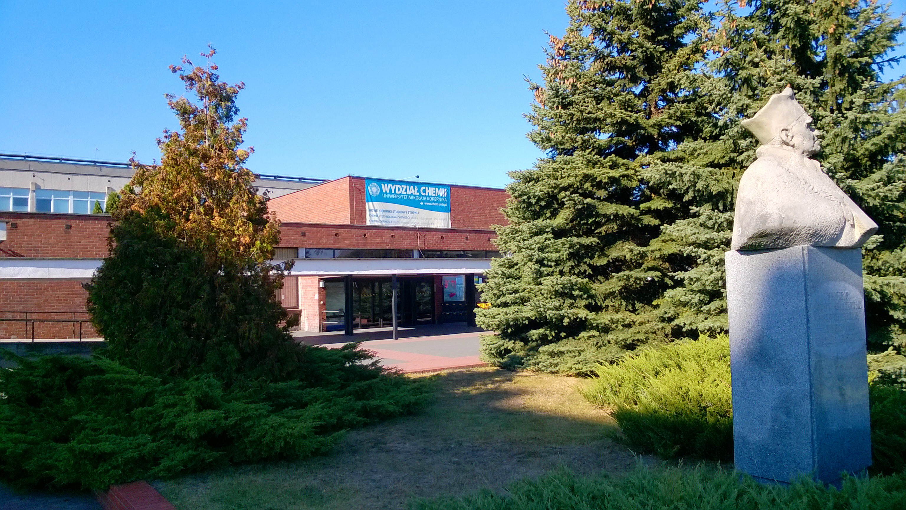 Wydział Chemii Uniwersytetu Mikołaja Kopernika66